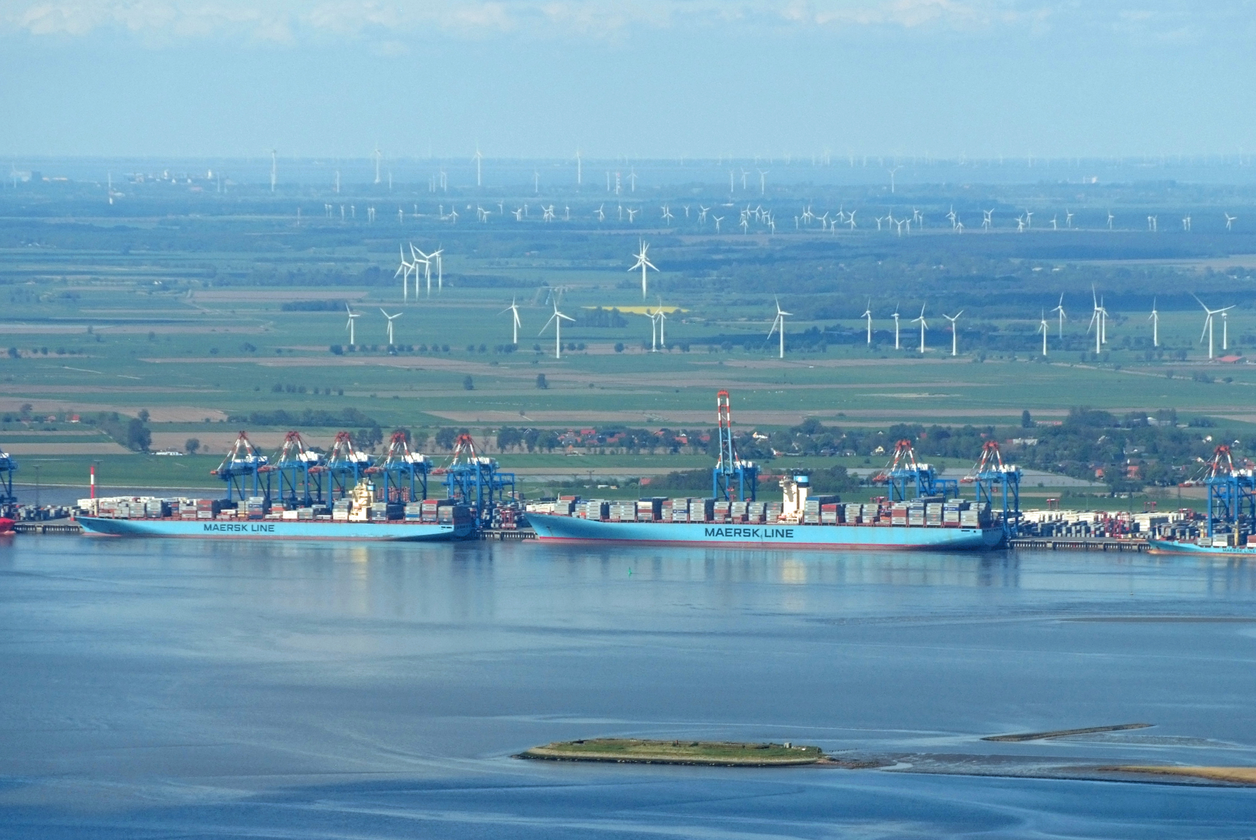 Fotoflug vom Flugplatz Nordholz-Spieka über Bremerhaven, Wilhelmshaven und die Ostfriesischen Inseln bis Borkum Stromkaje Bremerhaven , nördlicher Teil von Westen gesehen, im Vordergrund die Insel Langlütjen II